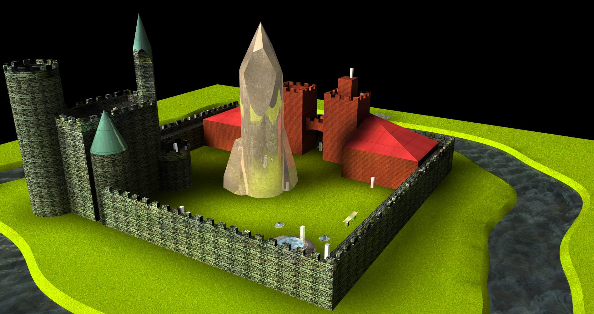 Burg Maravveruns, konstruiert und particle traced